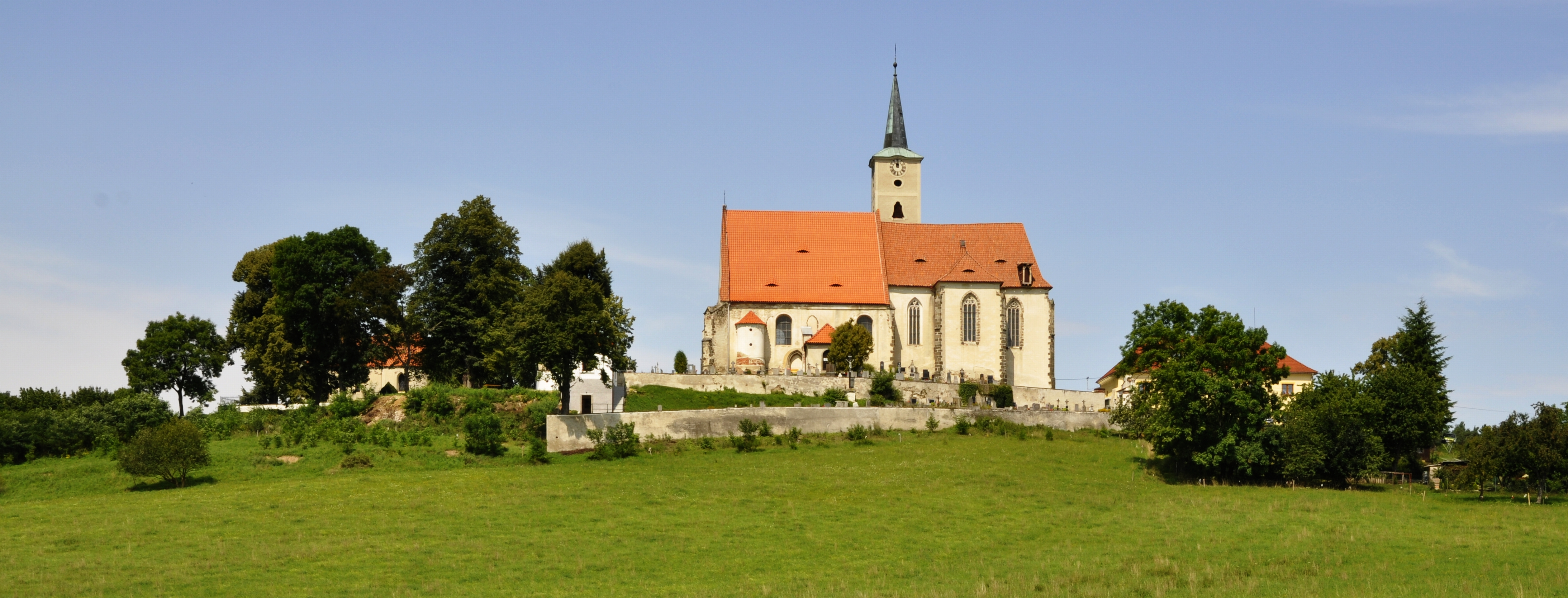 Kostel Nanebevzetí Panny Marie, Nezamyslice (okres Klatovy).